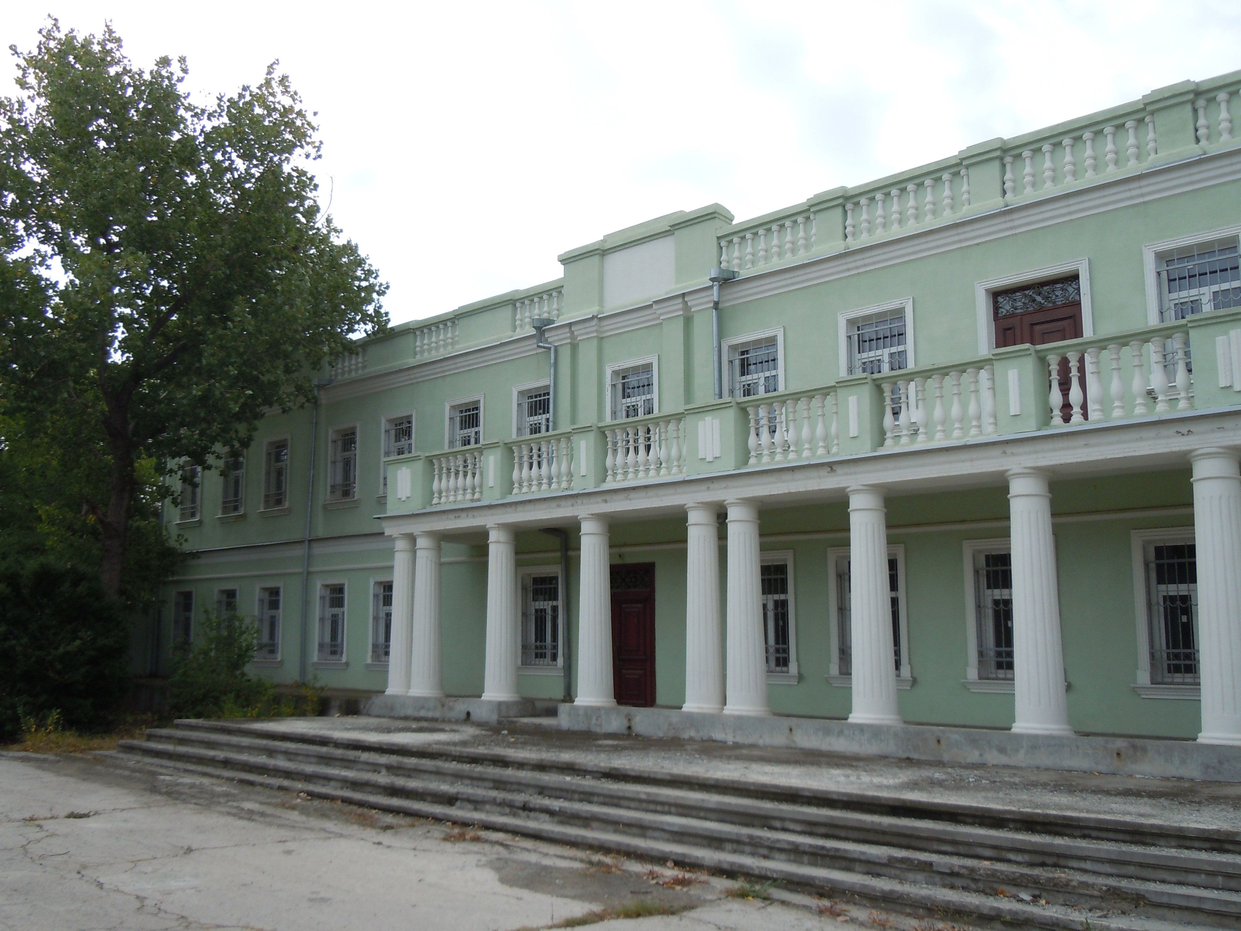 Ратуша, Болград, 28 червня пл., 5